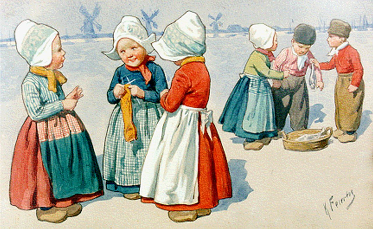 Karl Feiertag Kinder in der Volendamer Tracht Aquarell auf Papier 17,8 x 27,8 cm. Feiertag hielt sich angeblich zwischen 1900 und 1910 wiederholt in Volendam auf, daher hier das geschätzte Entstehungsdatum um 1910. .